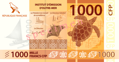 Billet en francs Pacifique (série de 2014)